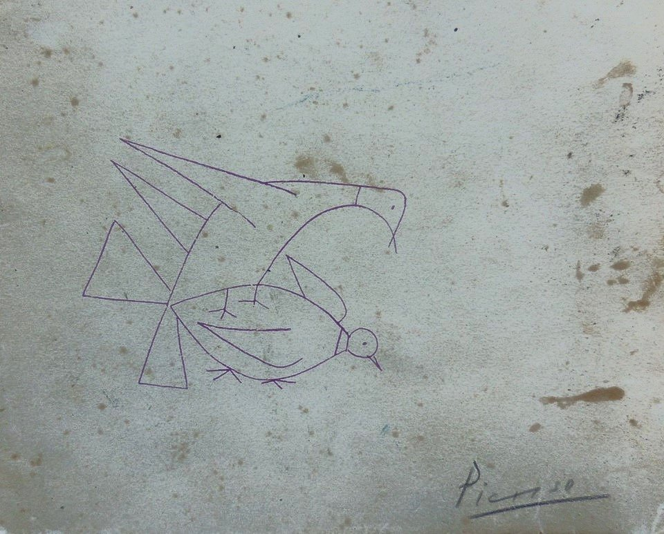 Хромолитография работы П. Пикассо с собственноручным автографом